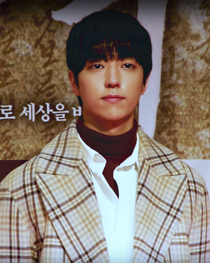 영화 '흥부' VIP시사회 포토월